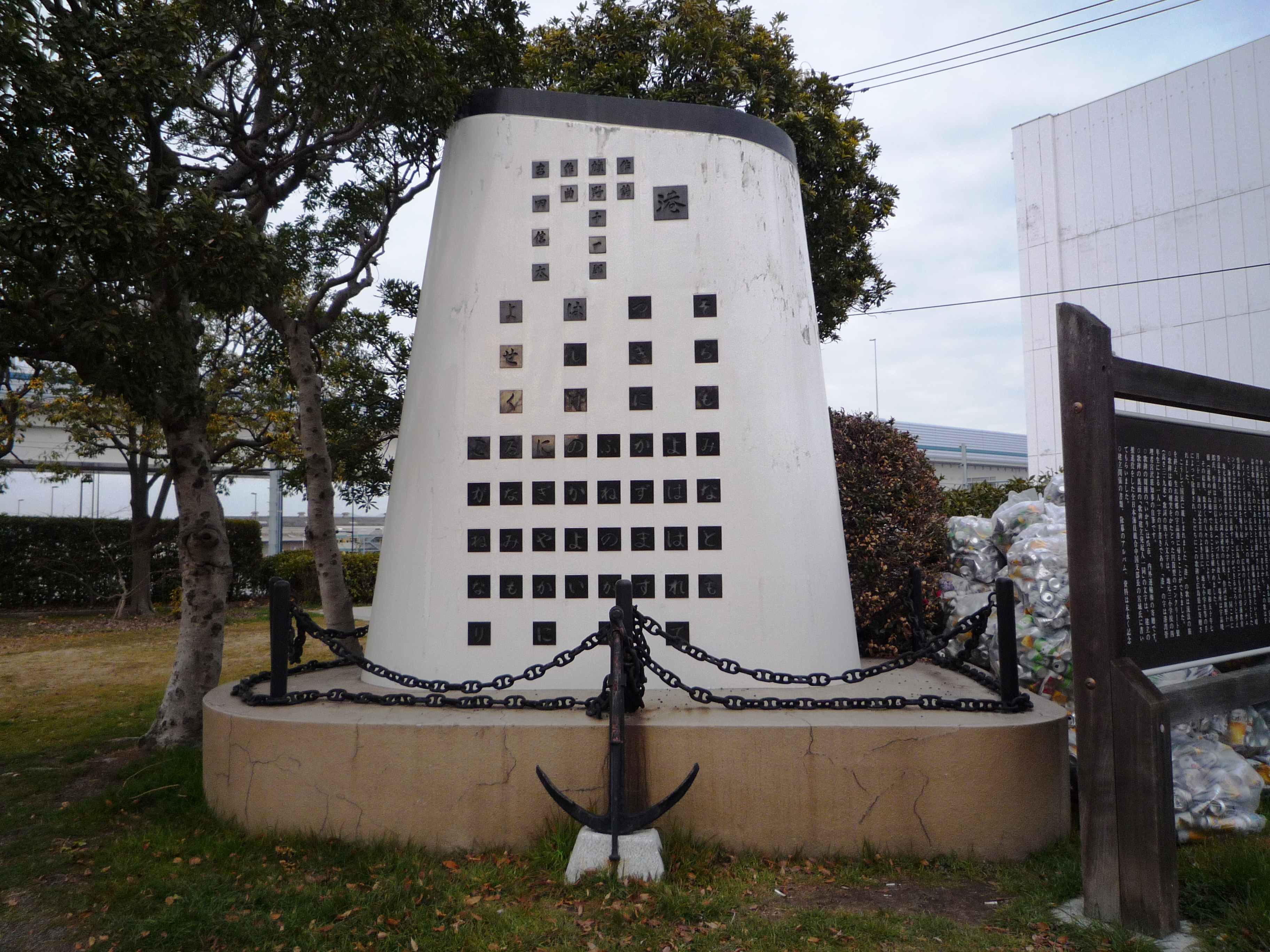 みなと歌碑 歌詞については、作詞者の旗野十一郎は1908年没のため、日本国では没後50年以上過ぎていることよりパブリックドメイン扱いになっている